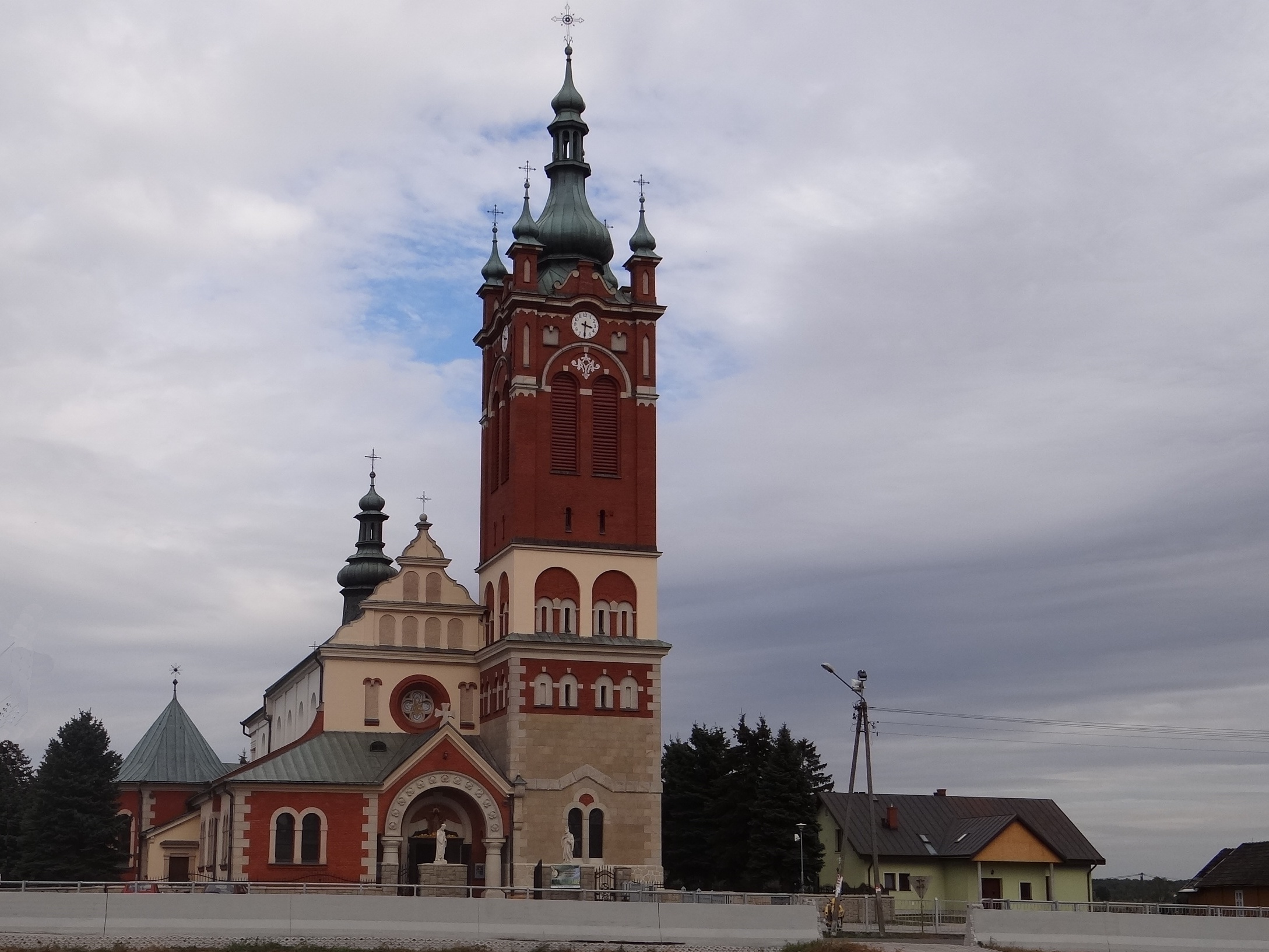 Borzęcin - rzymskokatolicki kościół parafialny p.w. Narodzenia Najświętszej Maryi Panny, XVII.